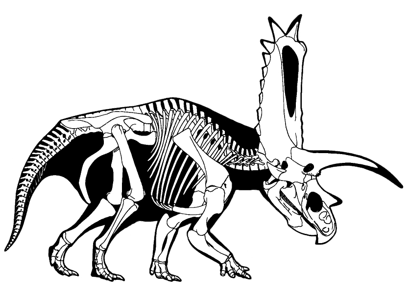 Pentaceratops skeletal restoration.